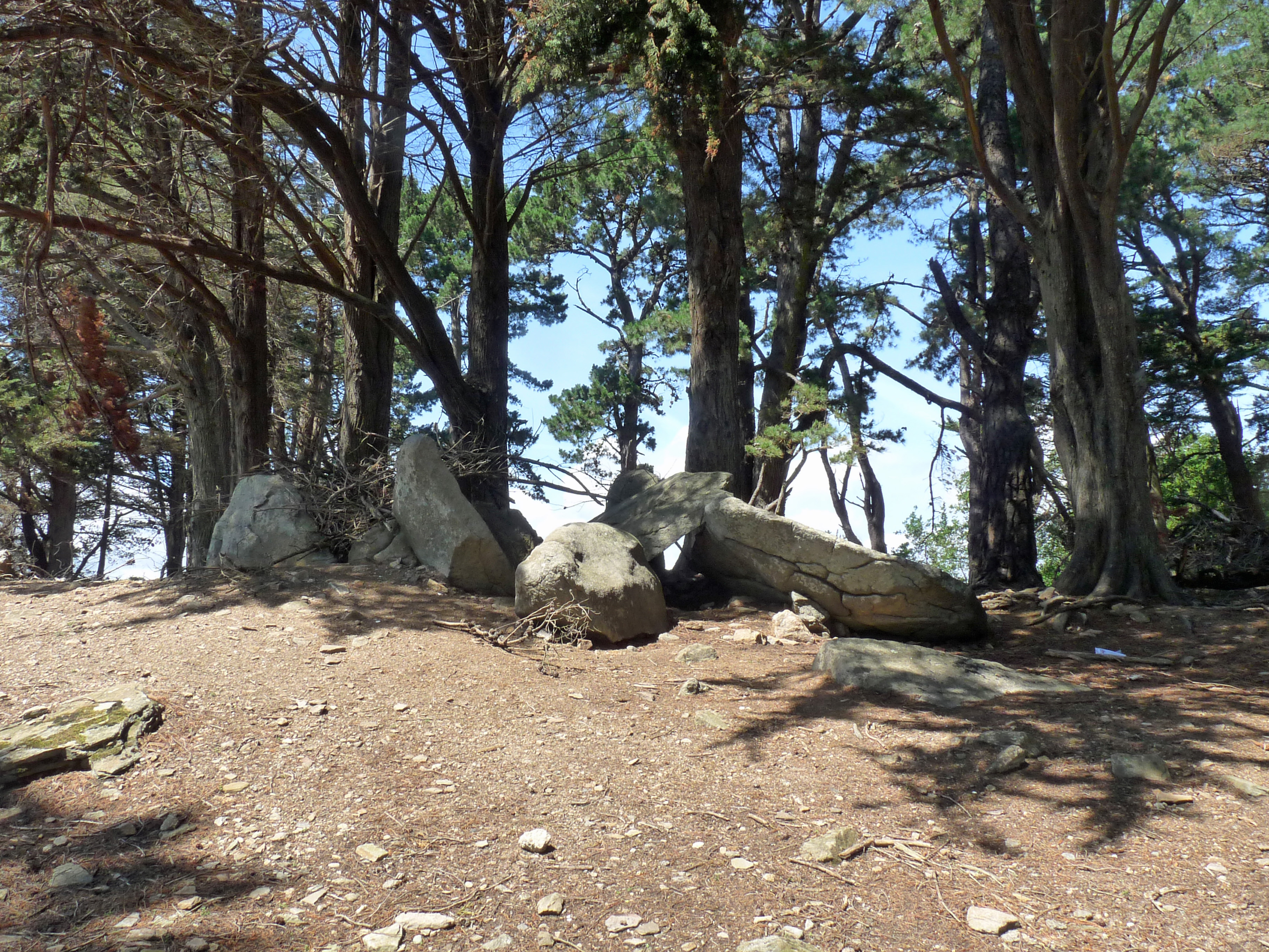 Vestiges mégalithiques de Pen Liouse, au sud de l'île d'Arz (Morbihan)